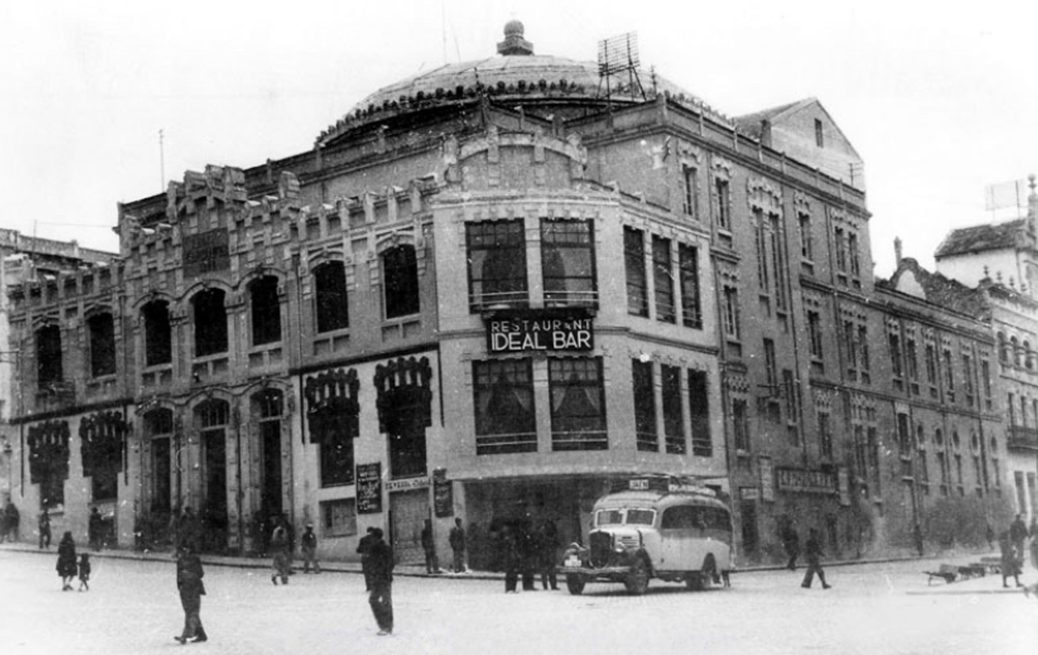 Imagen del desaparecido teatro Cervantes de Jaén (España)